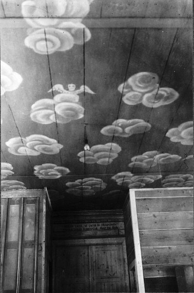 Takmålning. Efter restaurering 1950. Kategori: (03) Målningar på träTakmålning. Efter restaurering 1950.